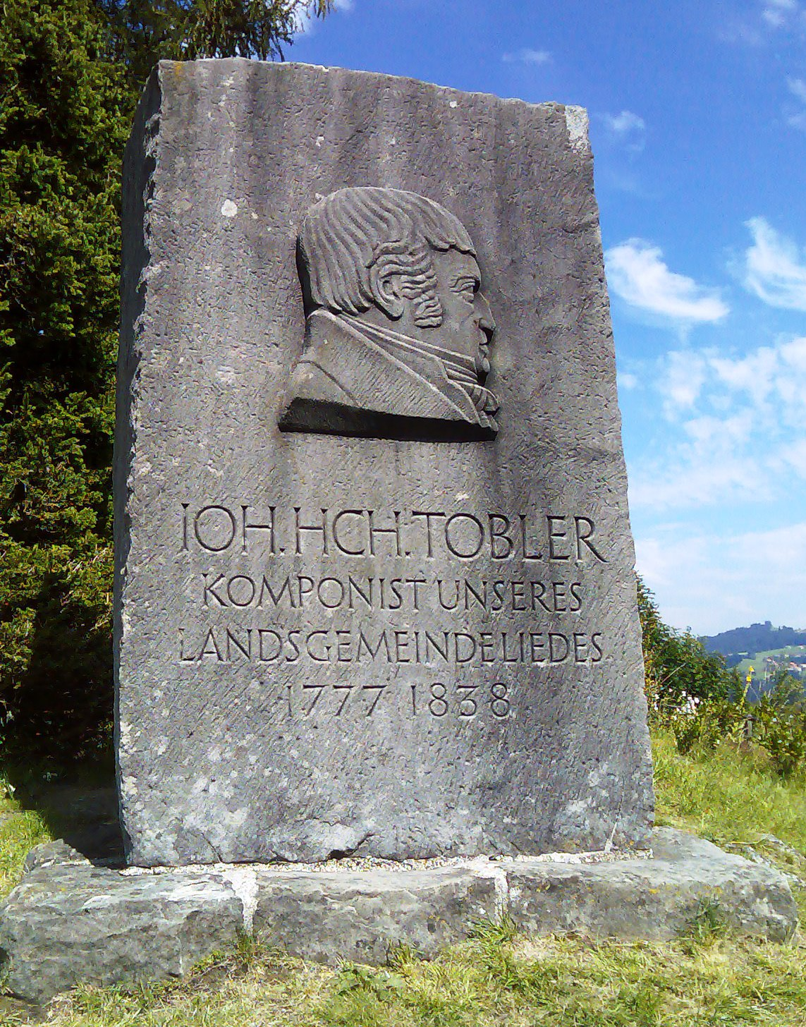 Ein etwa 1,5 Meter hoher behauener Stein (B; ca. 1 m / T; ca. 30 cm) In der oberen Hälfte des Steines ist das Gesichts-Profil eines Mannes als Relief dargestellt (Blickrichtung rechts). Darunter steht in den Stein gemeisselt: Joh. Hch. Tobler Komponist unseres Landsgemeindeliedes 1777 - 1838